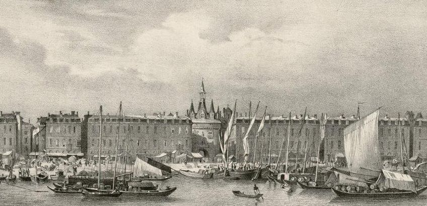 Estampe